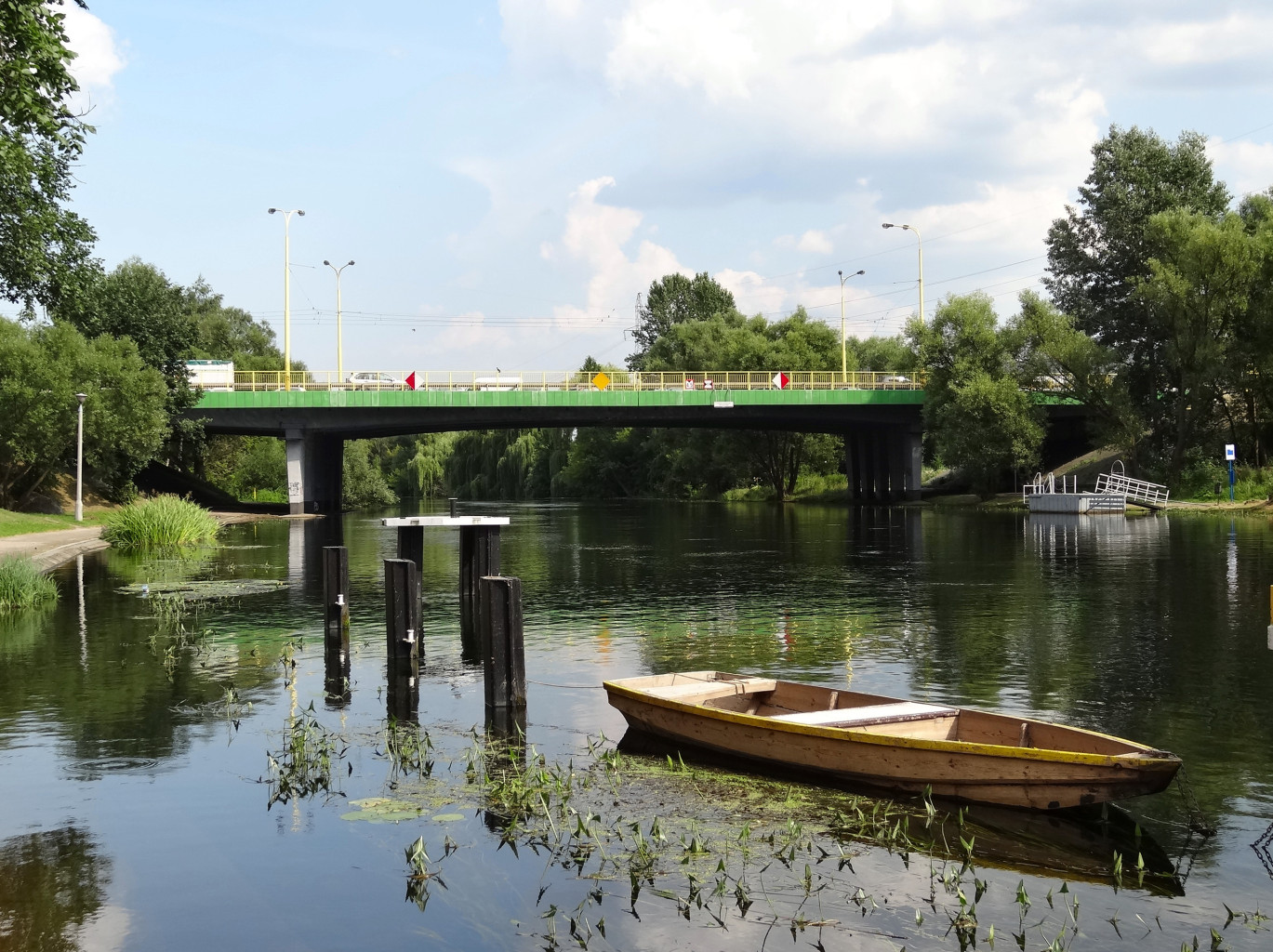 Most Pomorski nad Brdą w Bydgoszczy